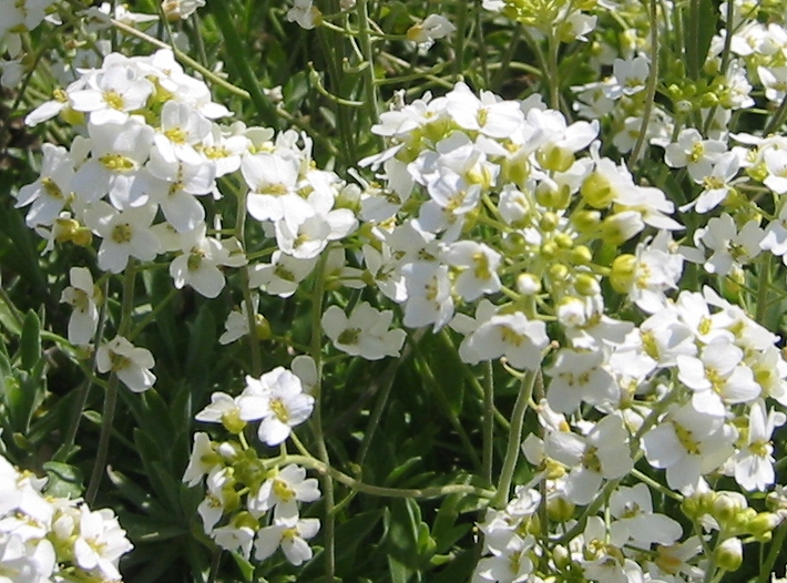 Schivereckia podolica; Austria; Vienna